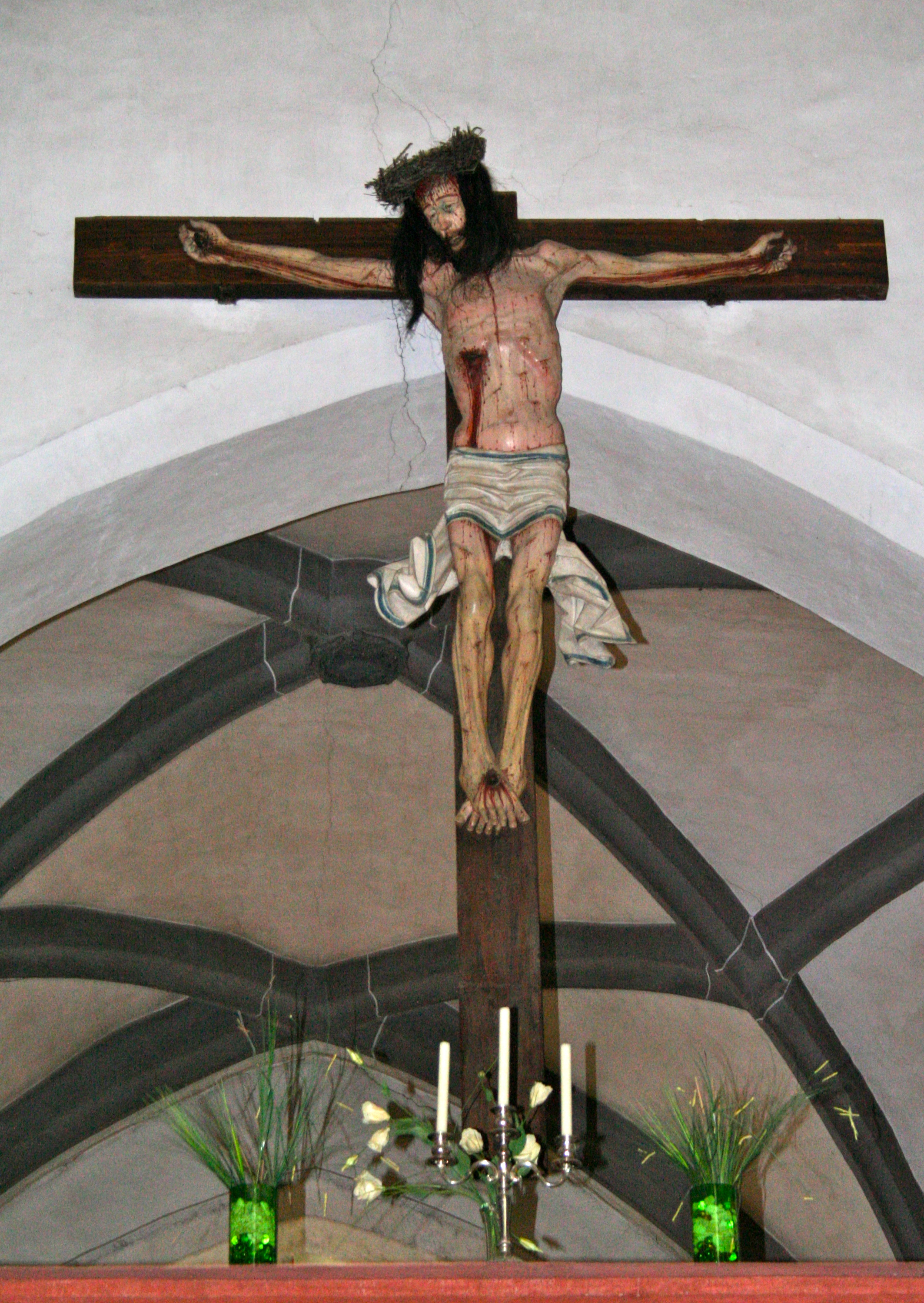 Kirche St. Maria und Michael in Churwalden, Kruzifix